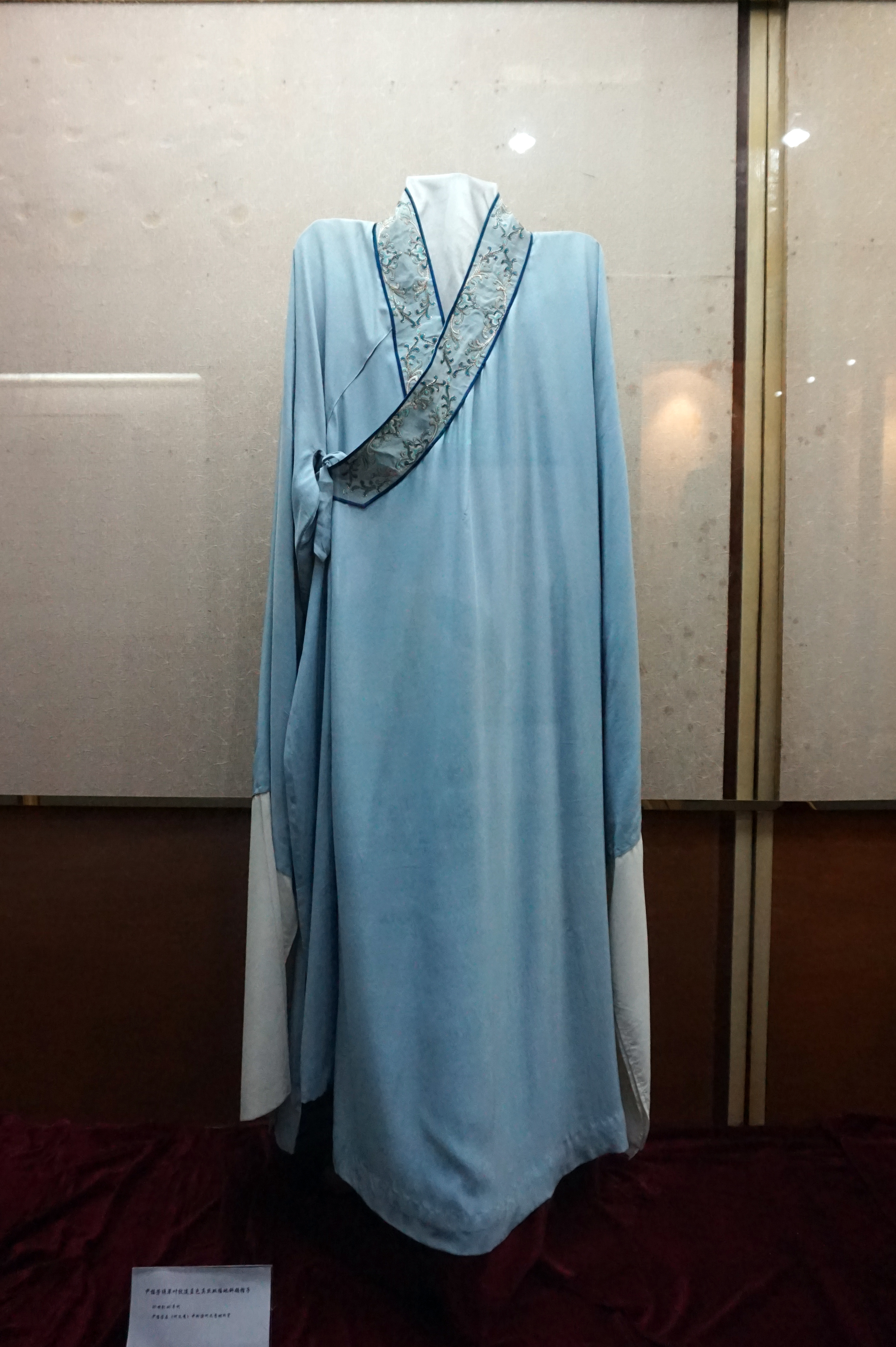 绣草叶纹淡蓝色真丝双绉地斜领褶子。20世纪60年代，尹桂芳《何文秀》中所穿戏服。嵊州越剧博物馆藏。